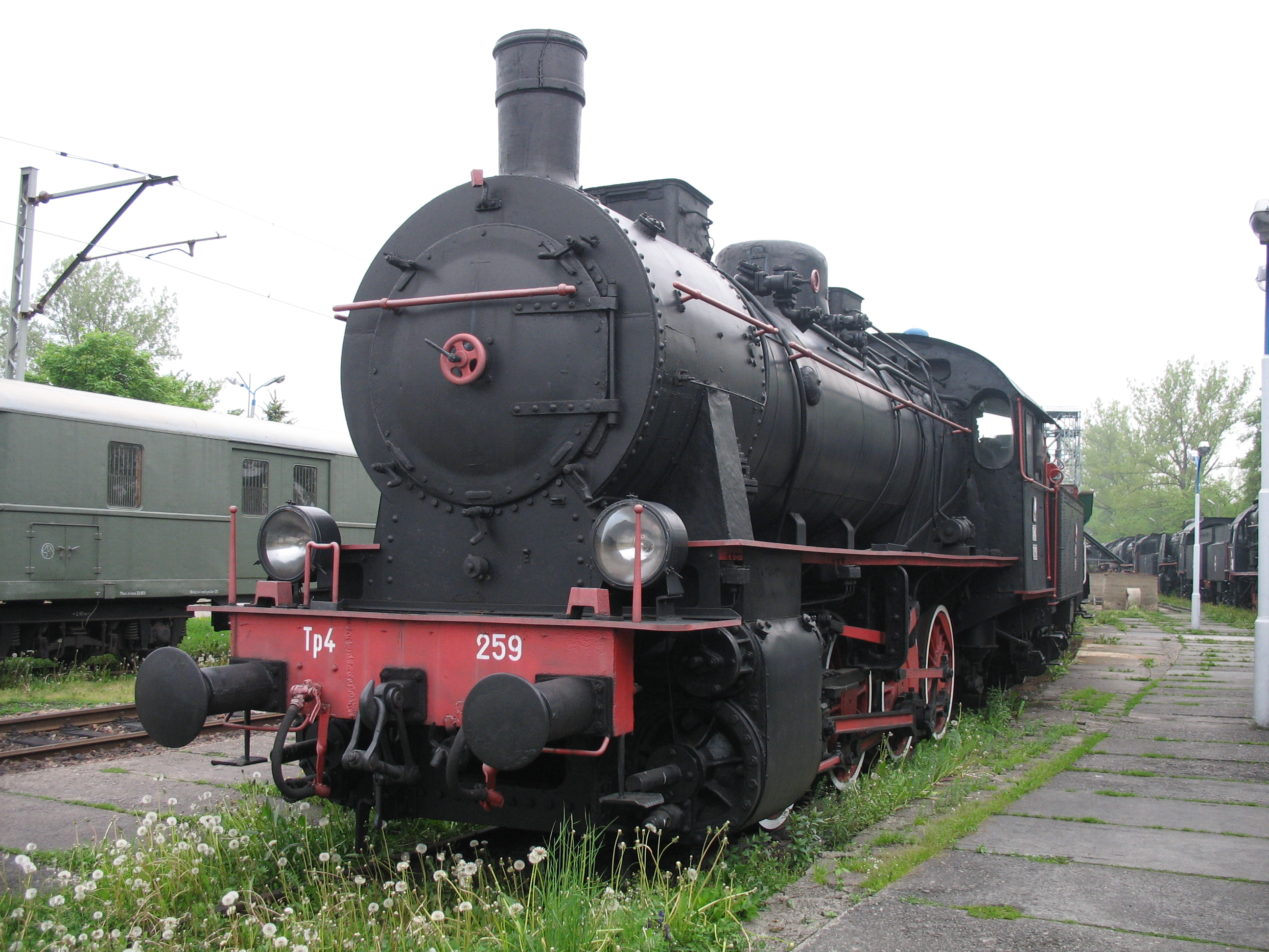 Lokomotywa parowa Tp4-259. Zbudowana w 1921 roku. Eksponat Skansenu w Chabówce.